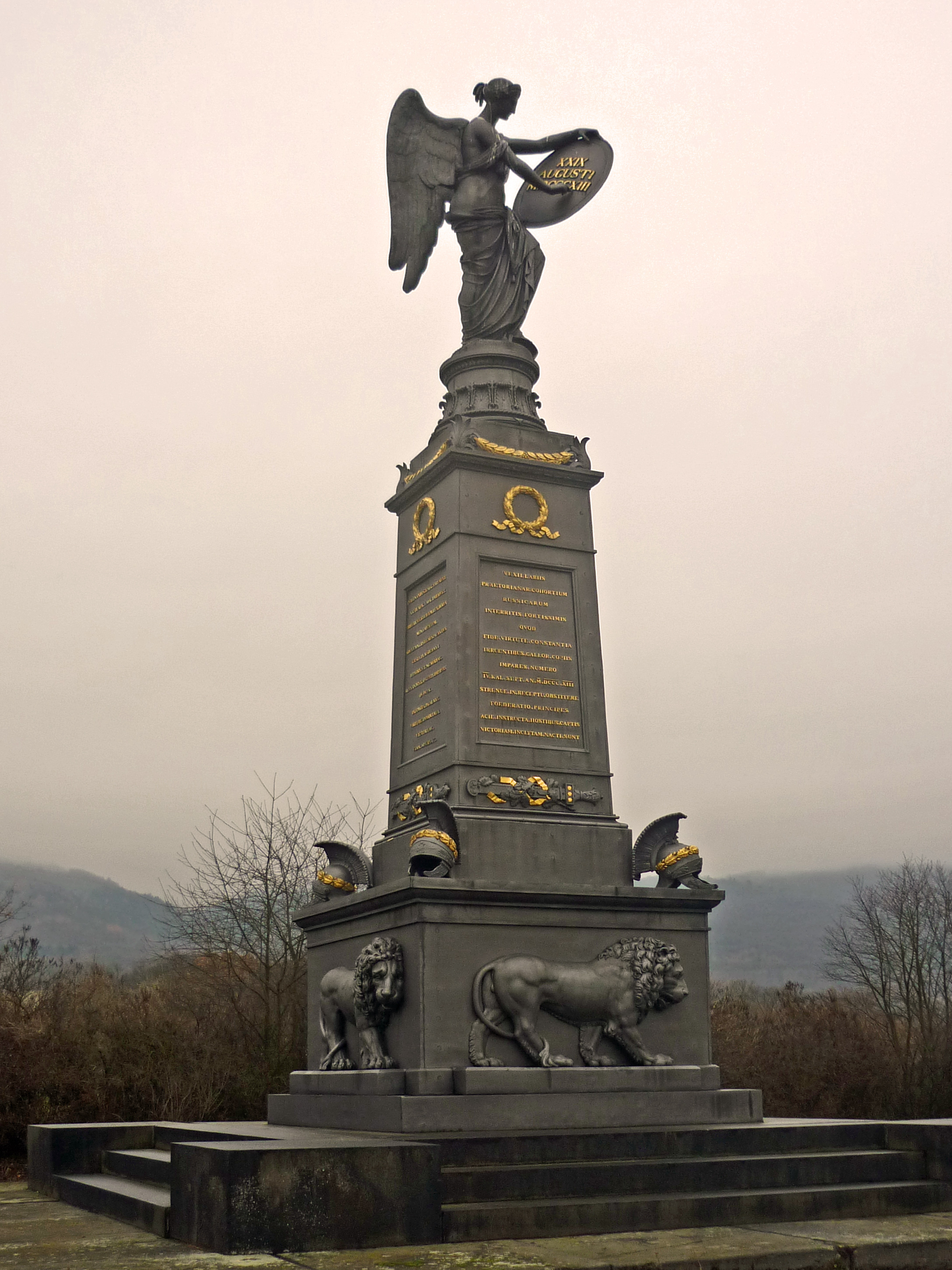 Russisches Denkmal zur Schlacht bei Kulm in Priesten (Přestanov)